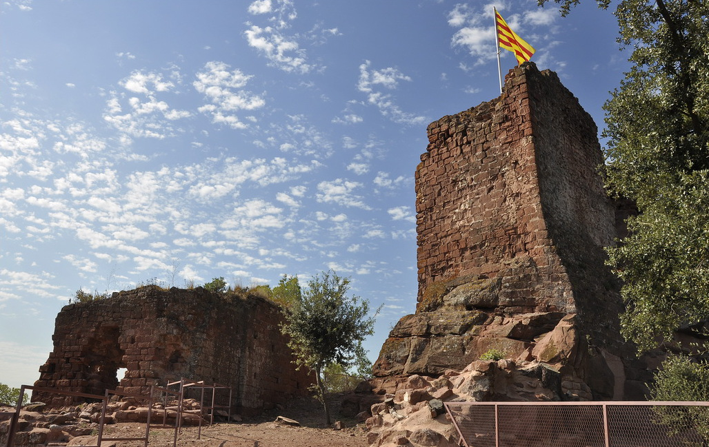 Castell de Cervelló